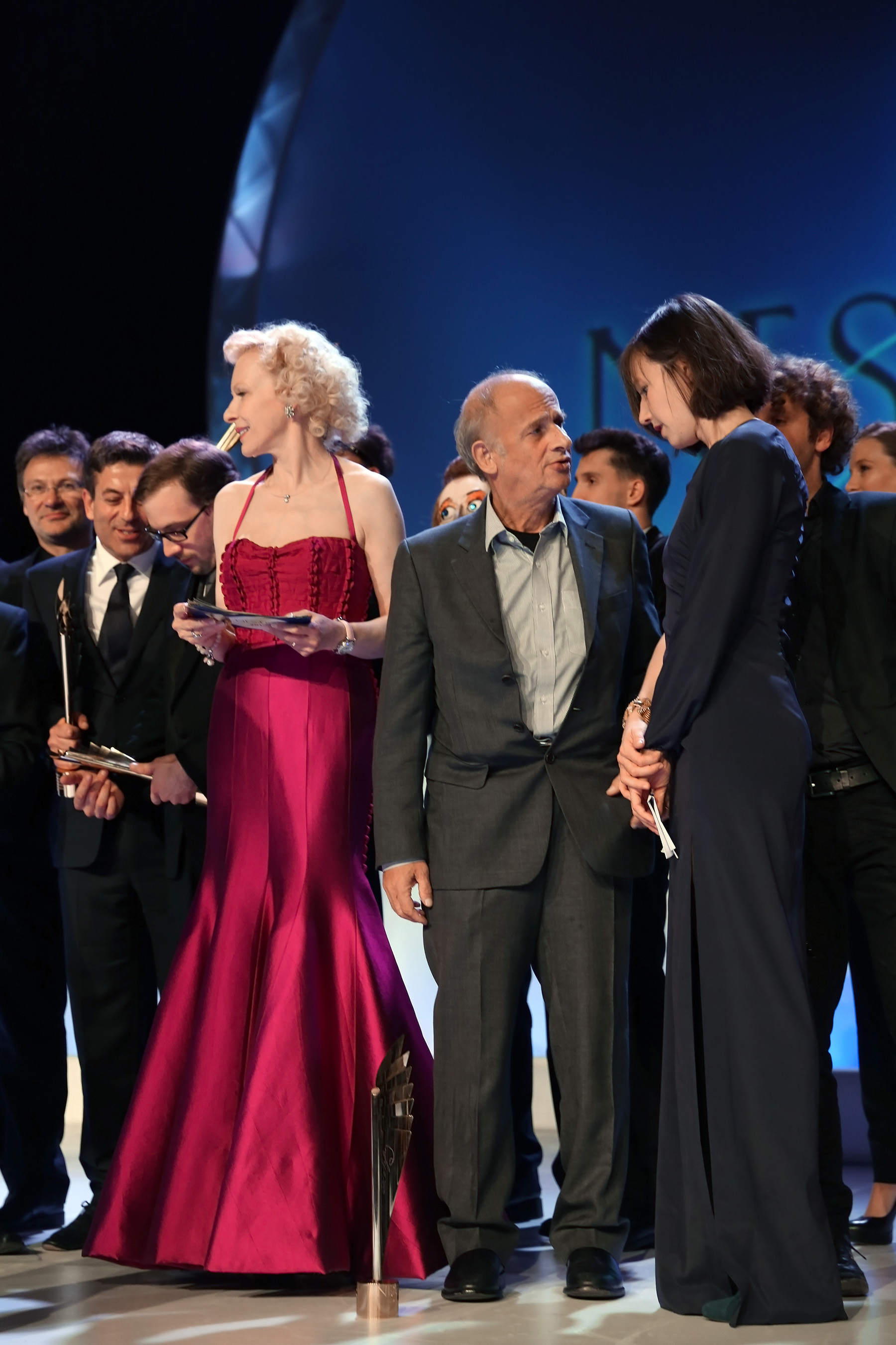 Sunnyi Melles, Luc Bondy, Johanna Wokalek u.a. - Nestroy-Theaterpreis 2013 in der Halle F der Wiener Stadthalle (Wien, Österreich).